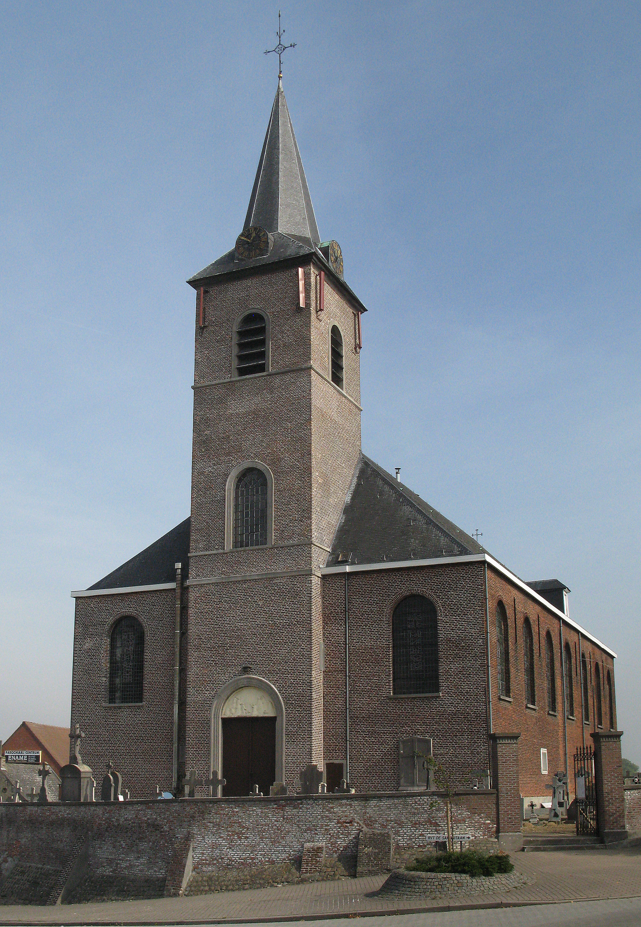 Kierch vun Nukerke